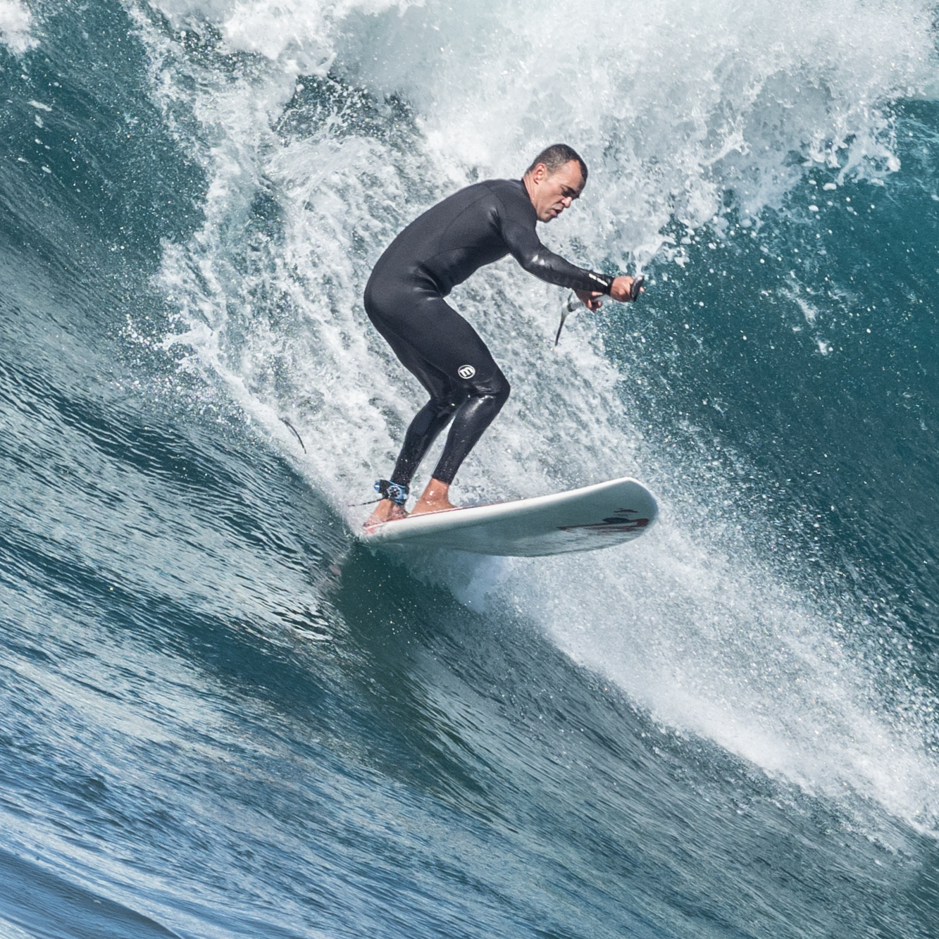 Playa de Las Canteras, Las Palmas, Gran Canaria, February 2018